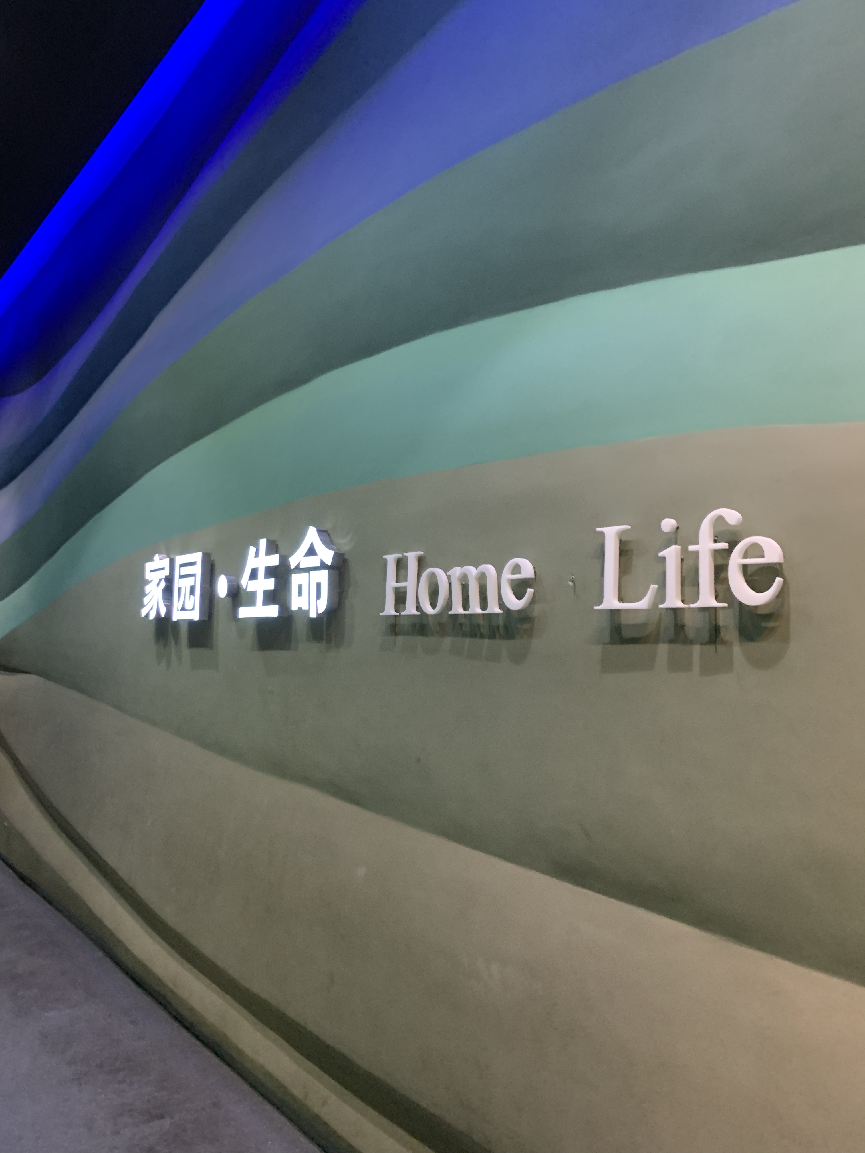 中文（中国大陆）: 天津自然博物馆 家园·生命 展区